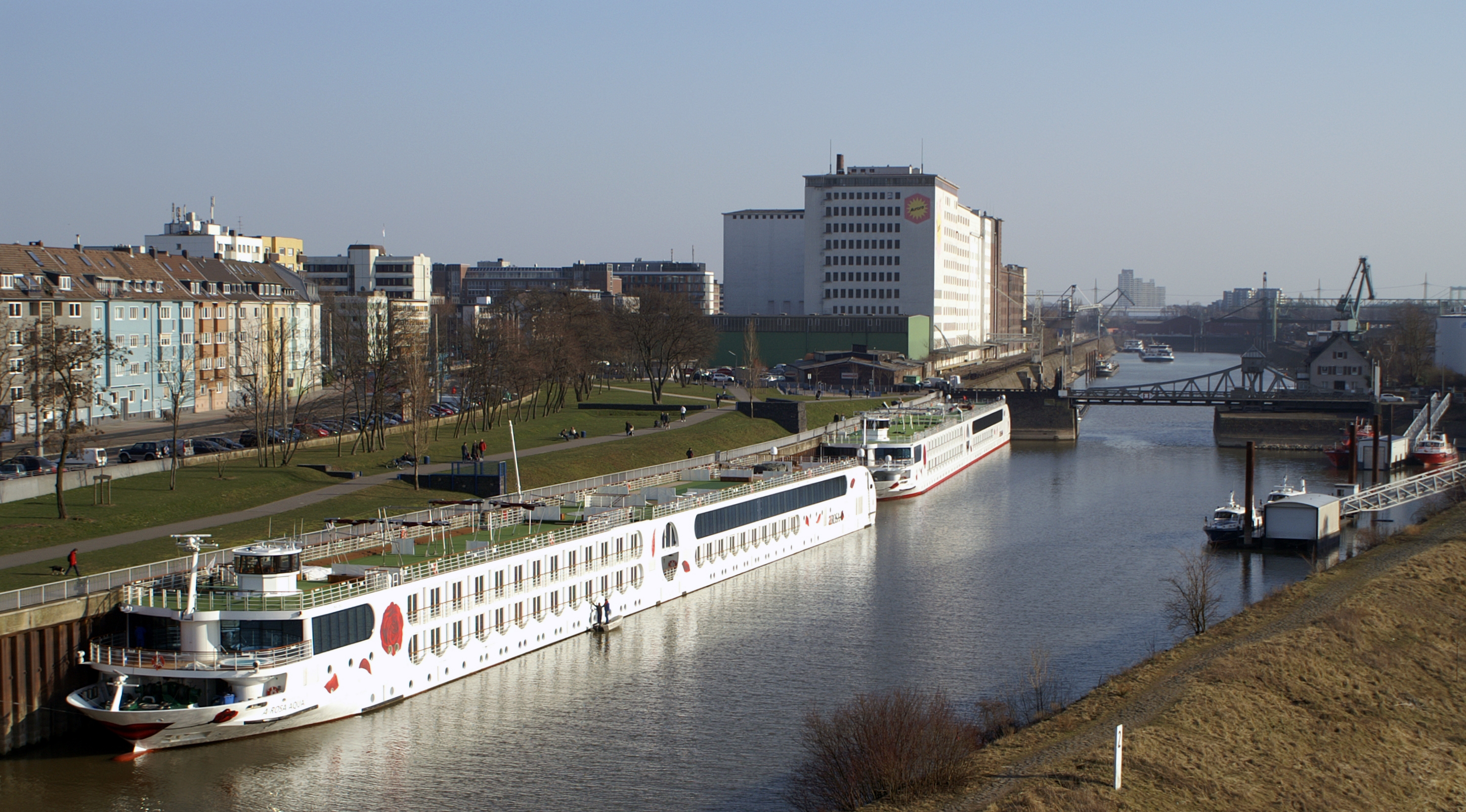 Flusskreuzfahrtschiff A'Rosa Aqua im Deutzer Hafen in Köln. Direkt dahinter das baugleiche Schwesterschiff A'Rosa Brava.